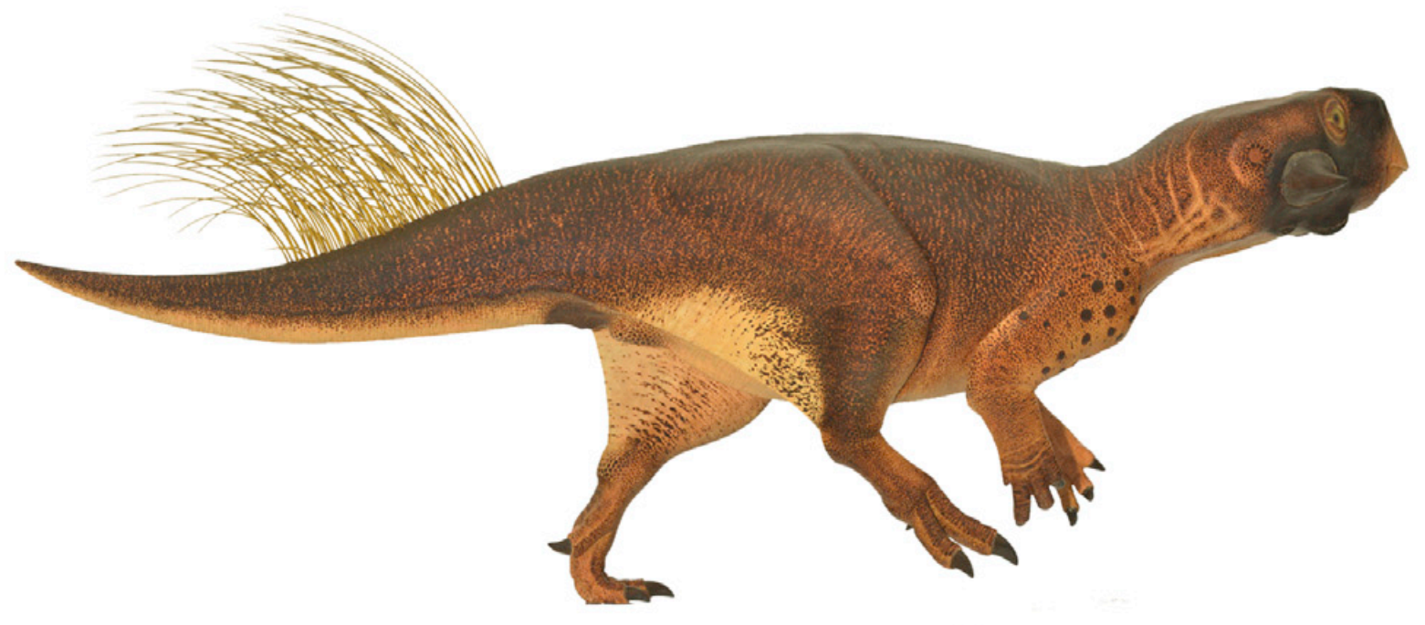 Psittacosaurus reconstruction